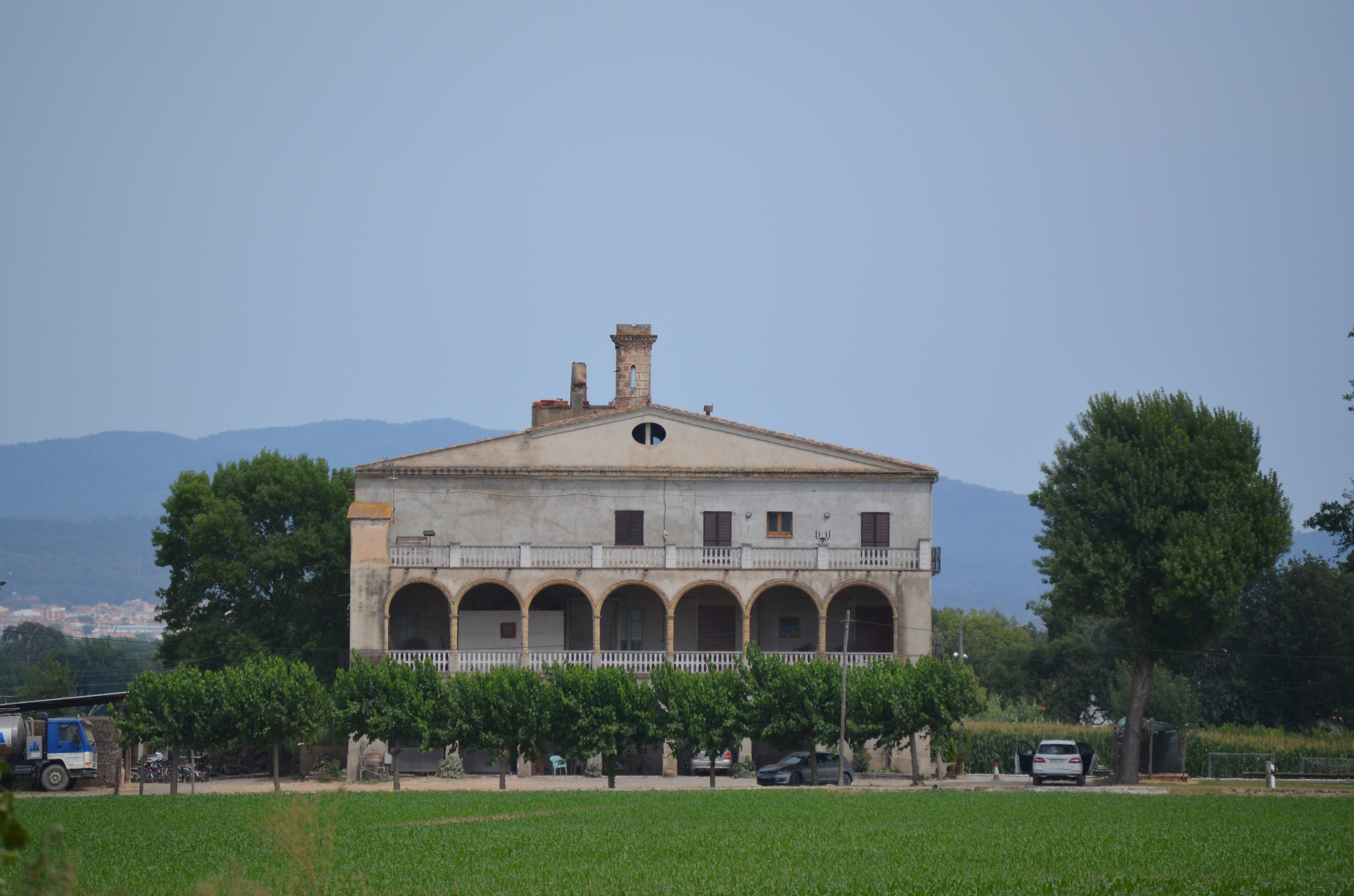 Riudellots de la Selva, Can Calderó Nou